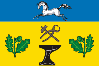 Флаг Ковалёвского сельского поселения, Краснодарский край, Россия.